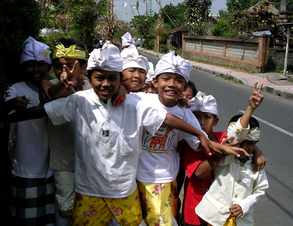 Kids in Ubud, Bali, Indonesia. Taken by User:Merbabu. Sept 2004